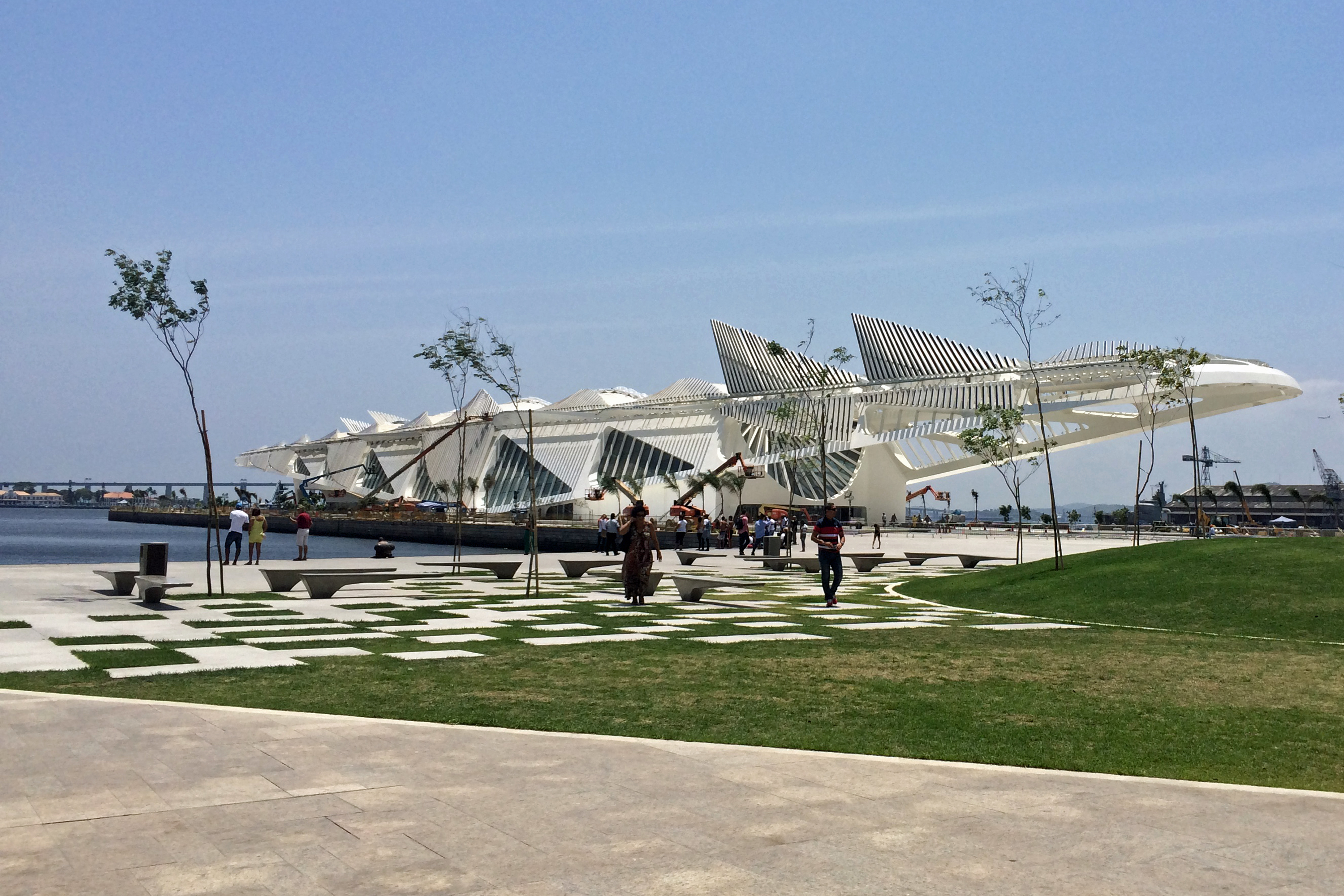 Museu do Amanhã desde a Praça Mauá, Porto Maravilha, Rio de Janeiro.